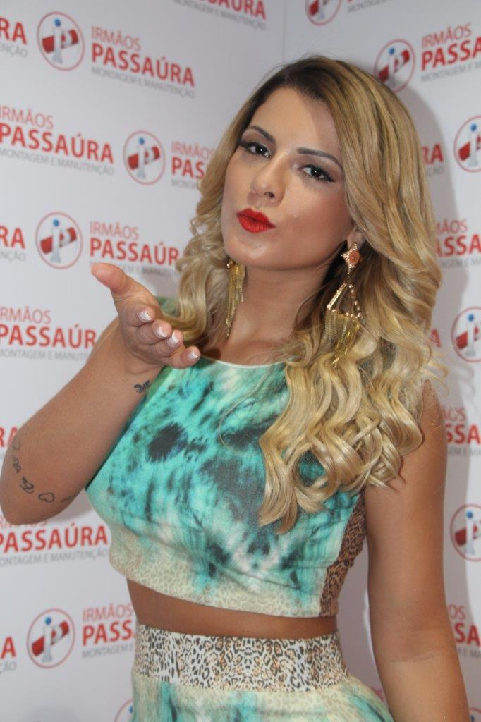 Babi Rossi (6)